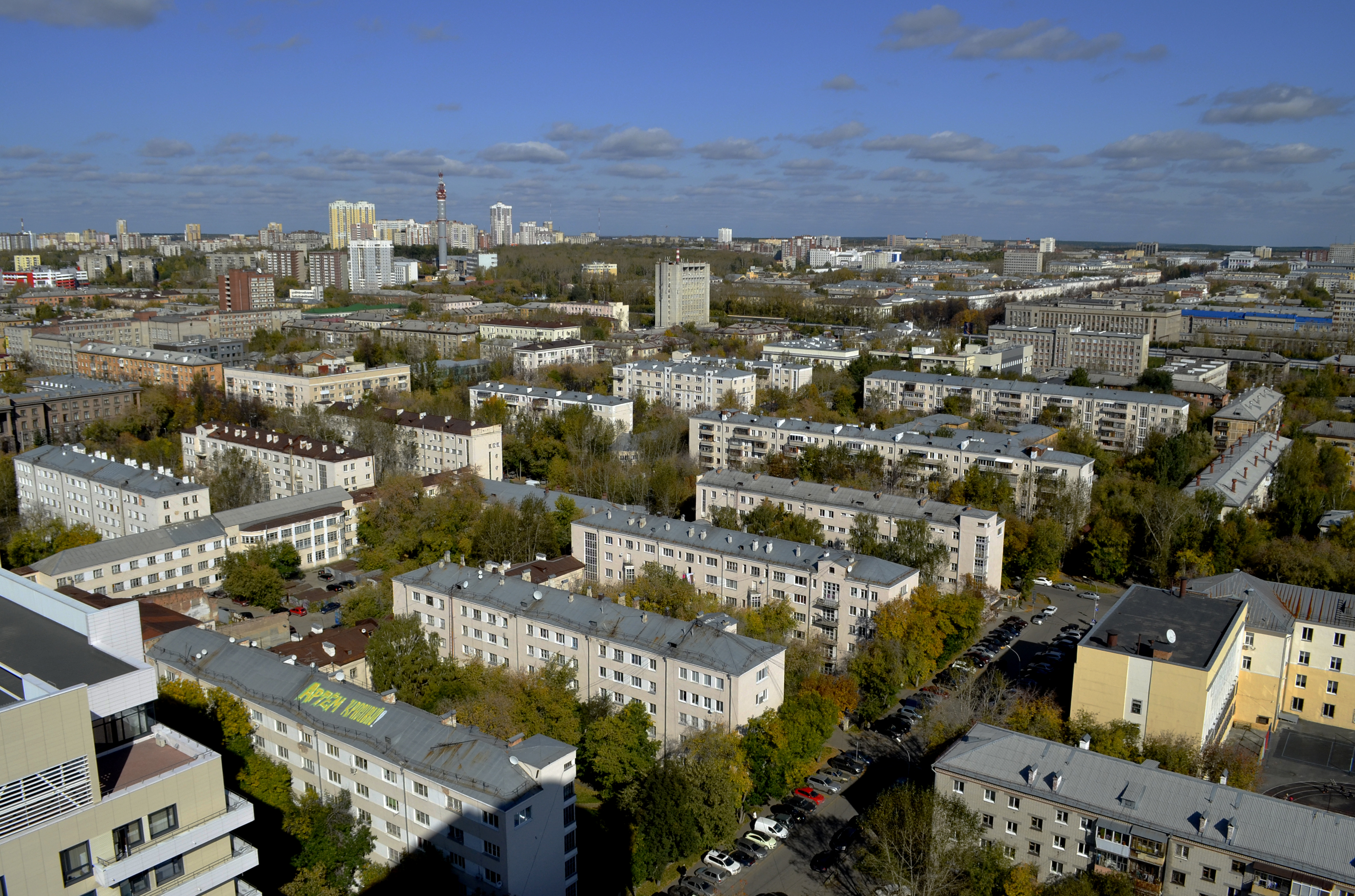 Комплекс зданий Гостяжпрома: проспект Ленина, 52-54, Екатеринбург, Свердловская область